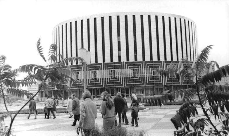 Dresden, Prager Straße, Kino ADN-ZB Häßler 12.10.1972 Dresden: Neues Filmtheater- Das Haus des Filmes, ein imposanter Bau, der sich gut in das Ensemble der Prager Straße einfügt, bietet in einem großen Filmsaal 1018 Besuchern Platz. Für weitere Vorführungen ist ein Saal mit 132 Plätzen vorhanden.